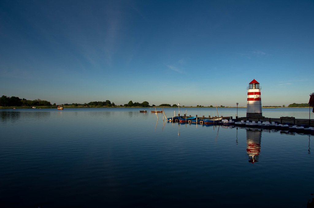 Fotos von Mecklenburg-Vorpommern